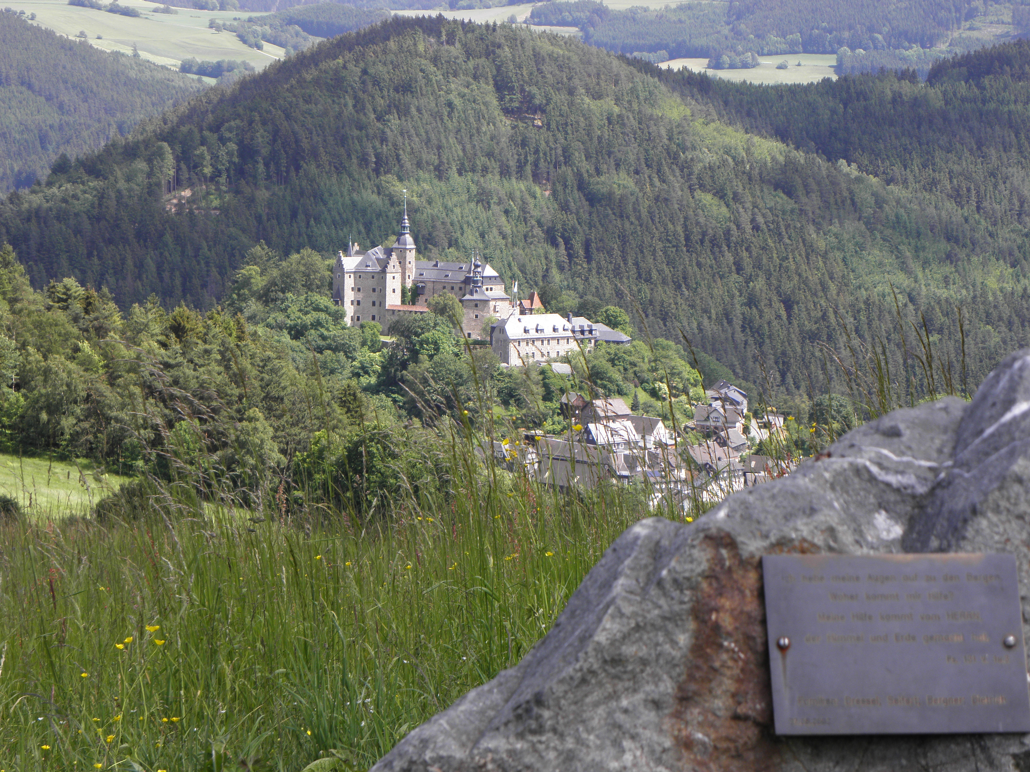 Blick auf Burg Lauenstein. Vorne sichtbar ein Gedenkstein der Familien Dressel, Seifert, Bergner und Dietrich.Spruch: „Ich hebe meine Augen auf zu den Bergen. Woher kommt meine Hilfe? Meine Hilfe kommt von dem HERRN, der Himmel und Erde gemacht hat.“ Ps. 121.1+2